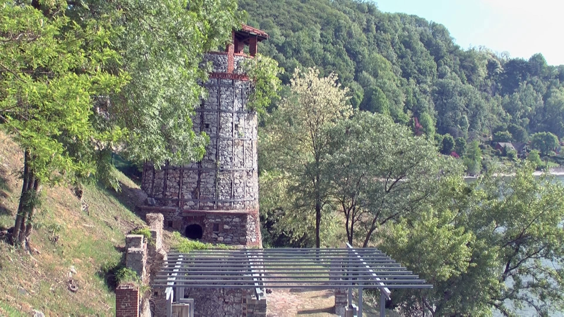 Fornace del "port del Pinet" Ispra 1 maggio 2011